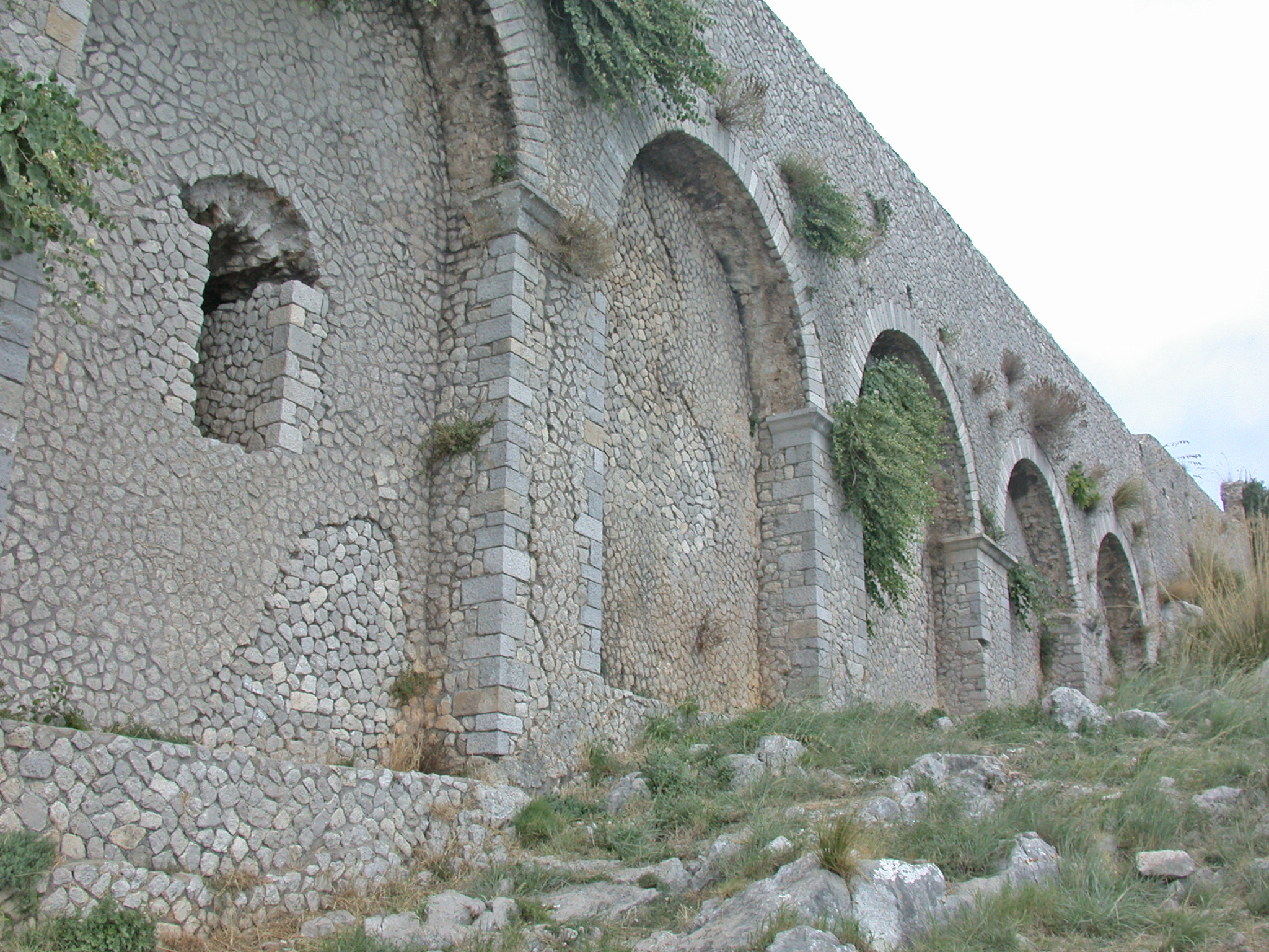 Terracina (provincia di Latina, Lazio, Italia), tempio di Giove Anxur, fianco della terrazza su cui sorgeva il tempio, in Opus incertum.